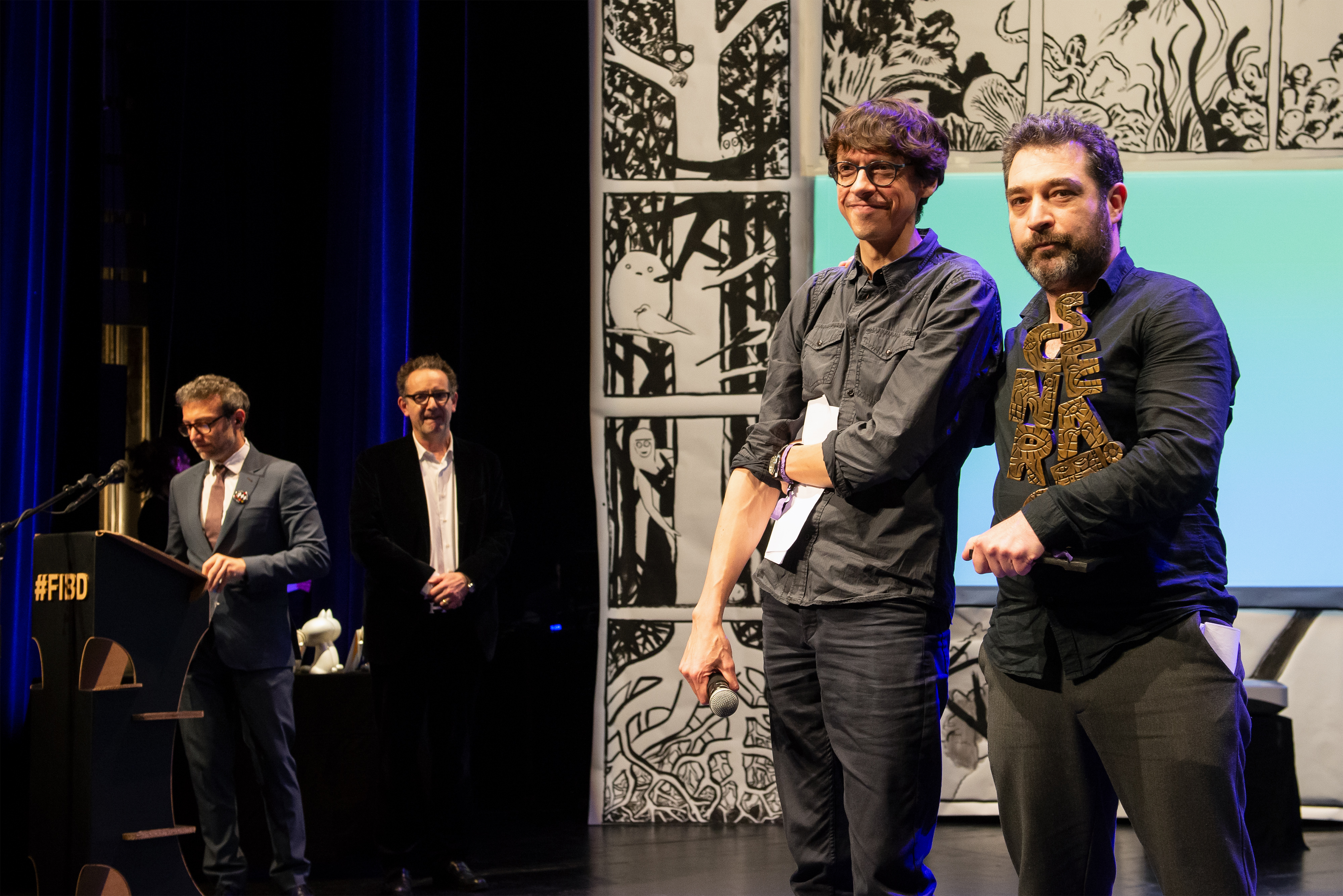 Remise du prix Goscinny aux scénaristes Fabien Vehlmann et Gwen de Bonneval - Cérémonie des Fauves, Festival International de la Bande Dessinée d'Angoulême 2020.